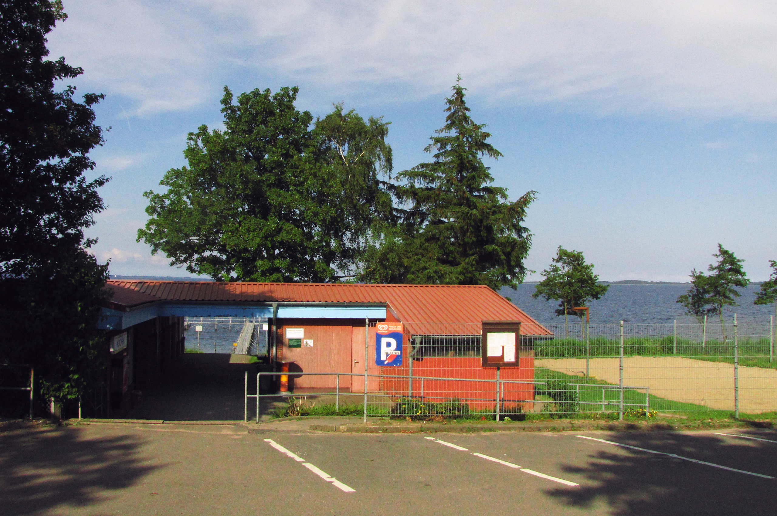 Seebadeanstalt mit Gebäude Badebrücke und Aussenanlagen in 24972 Steinberg Ostsee OT Norgaardholz an der Geltinger Bucht - Foto 2012 Wolfgang Pehlemann IMG_3272